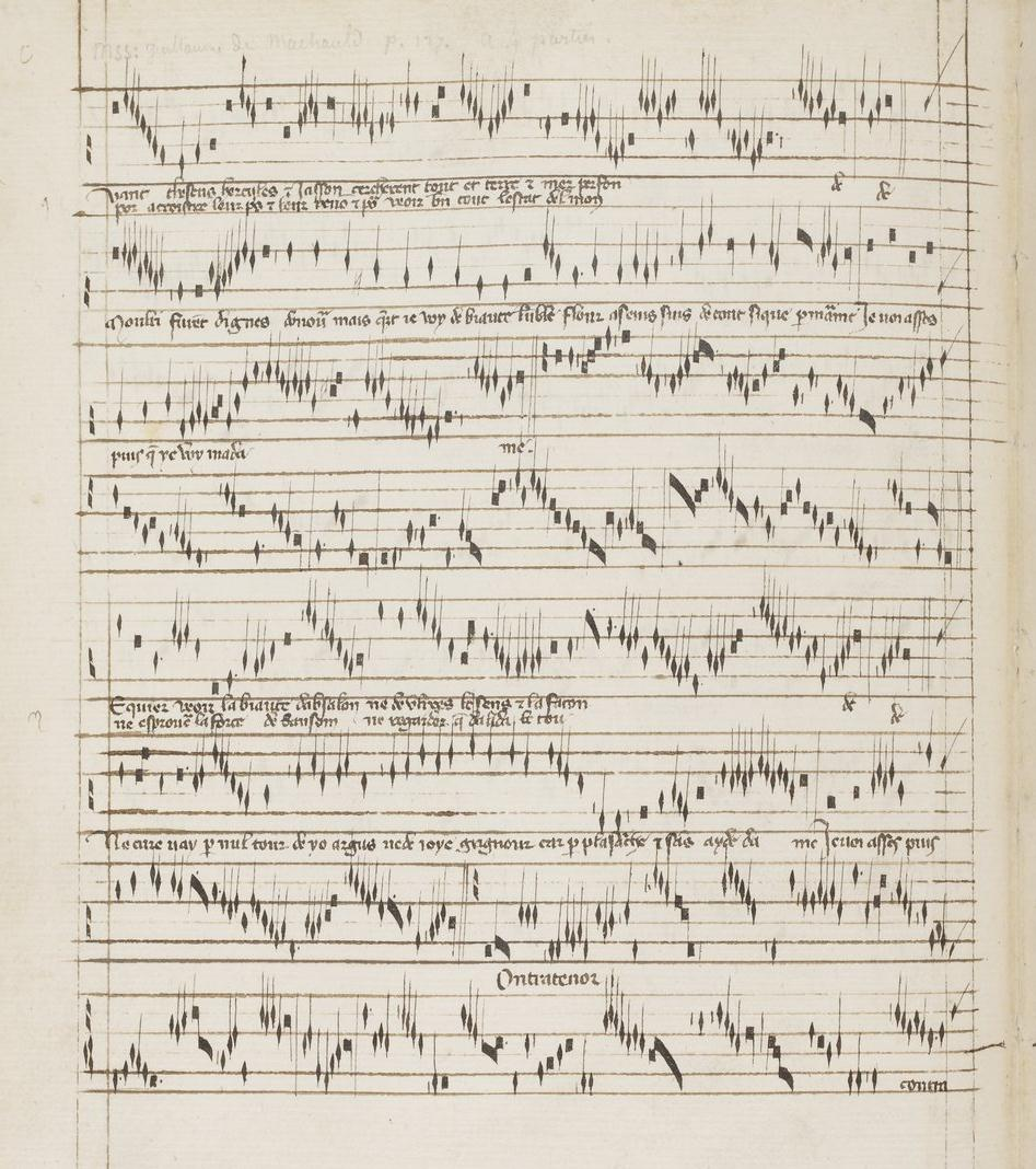 Paris, Bibliothèque Nationale, fonds français 6771 (Reina Codex)